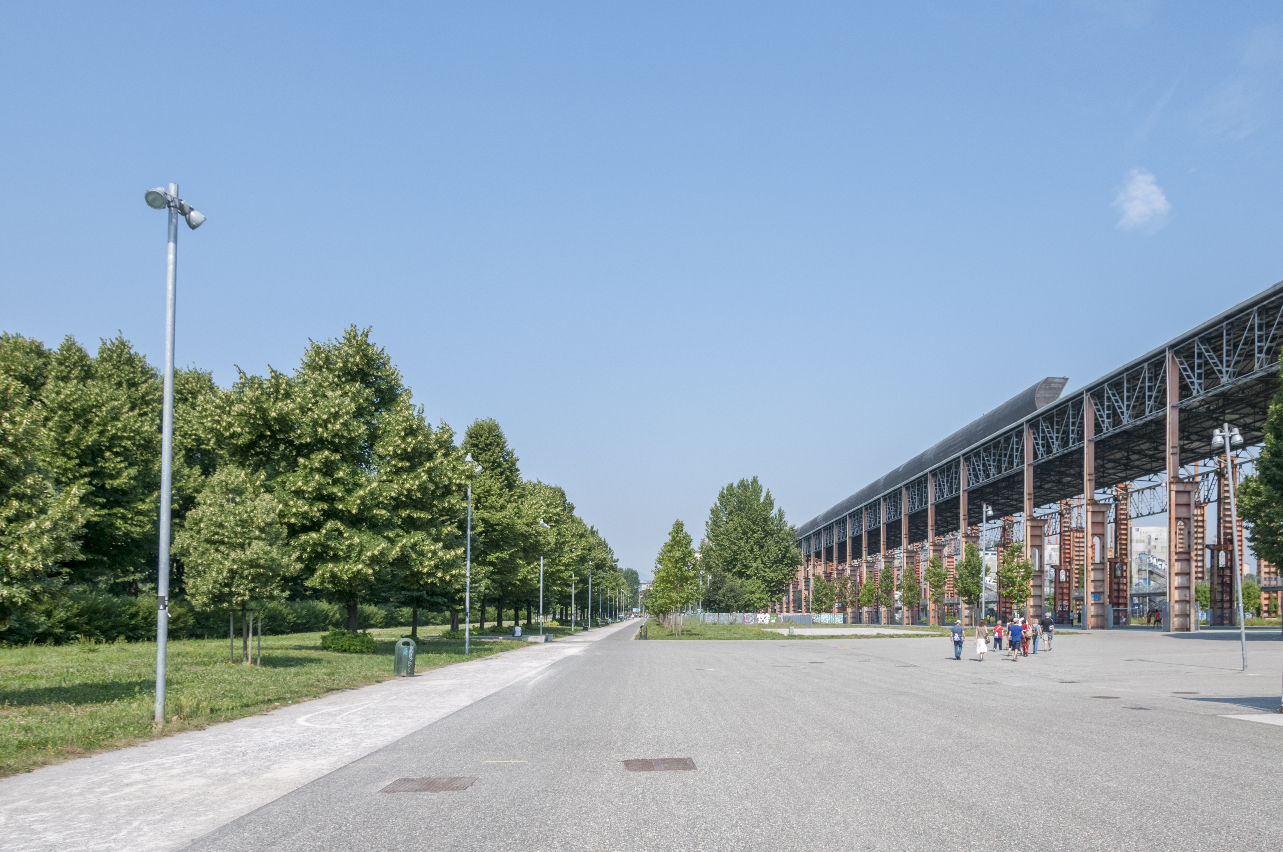 Parco Dora, Torino